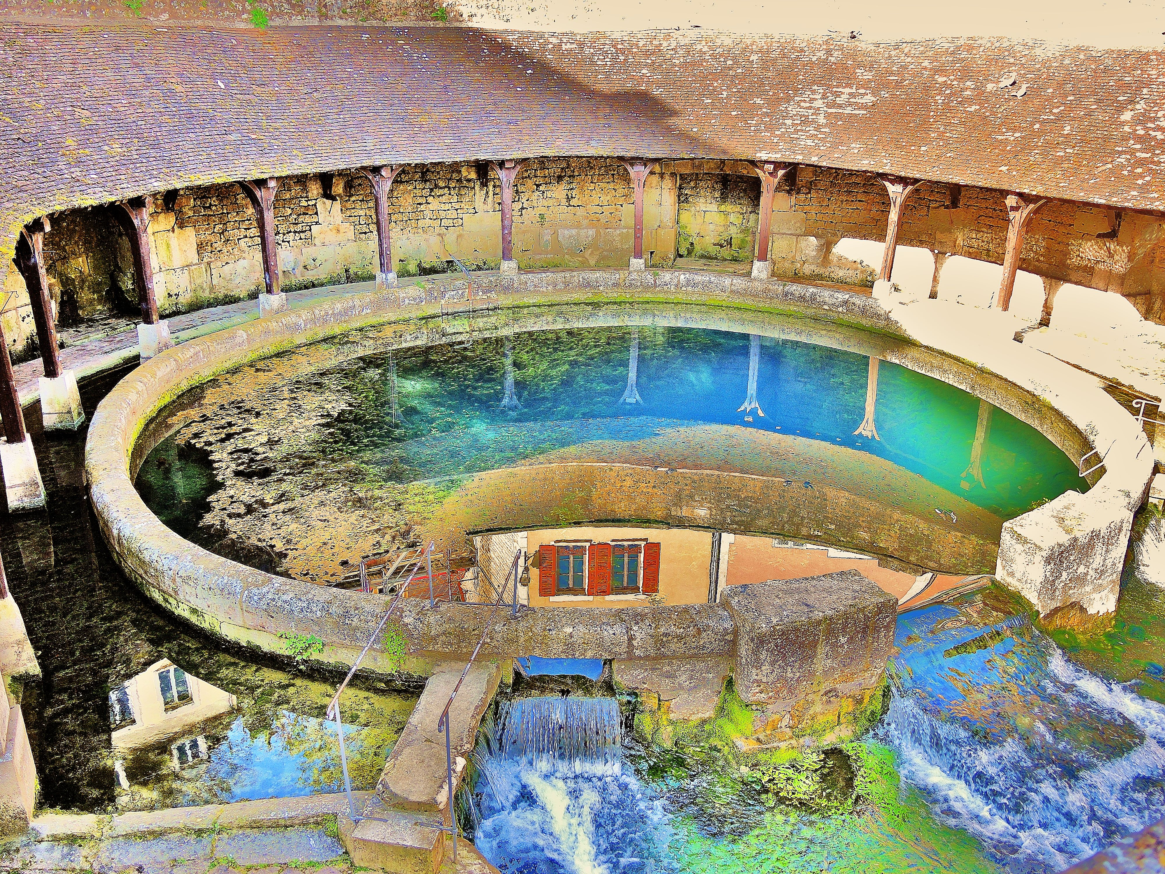 Source résurgente nommée fosse Dionne.